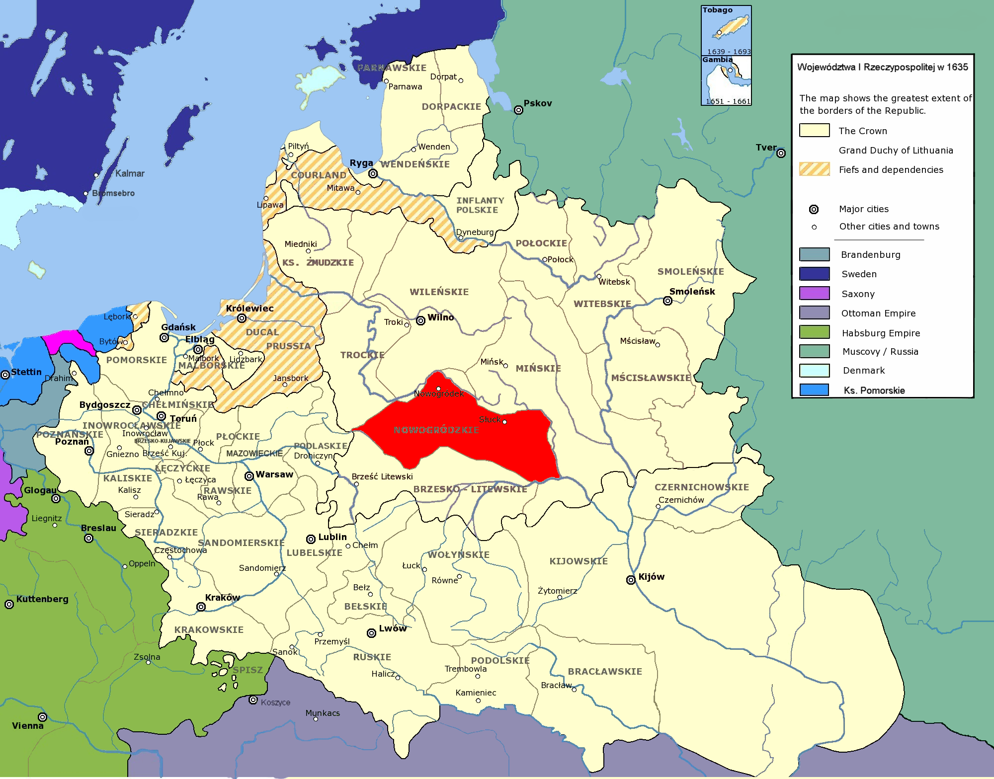 Województwo Nowogródzkie I RP authors: user:Halibutt and user:Mathiasrex